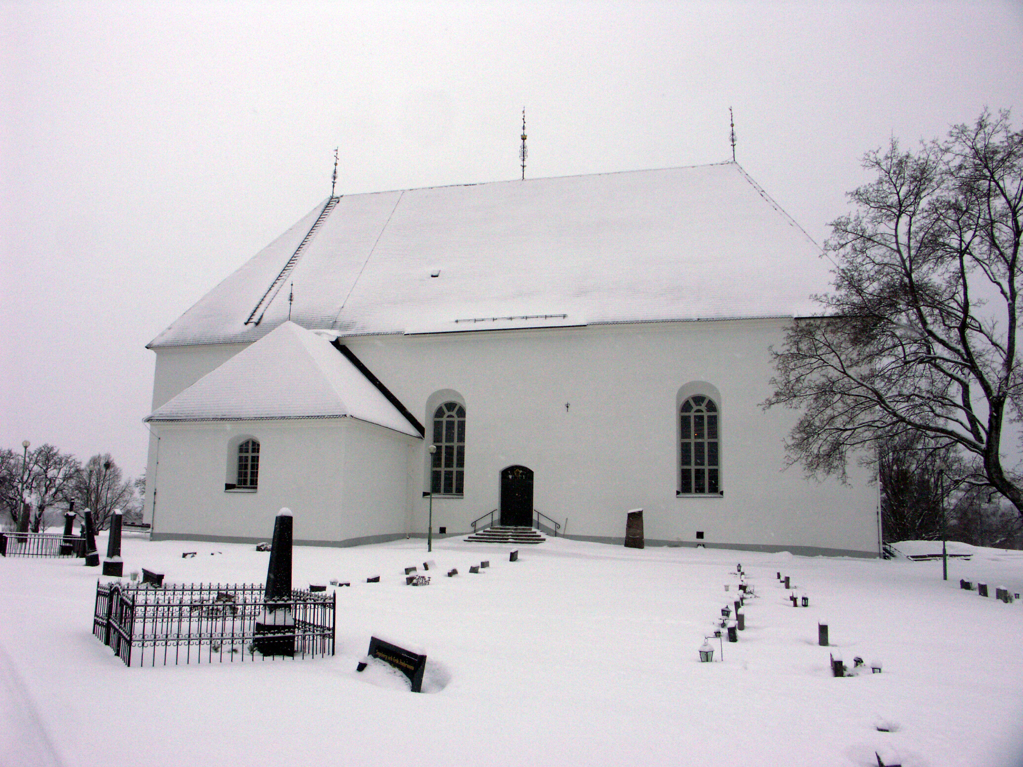 Beskrivning: Ljusdals kyrka